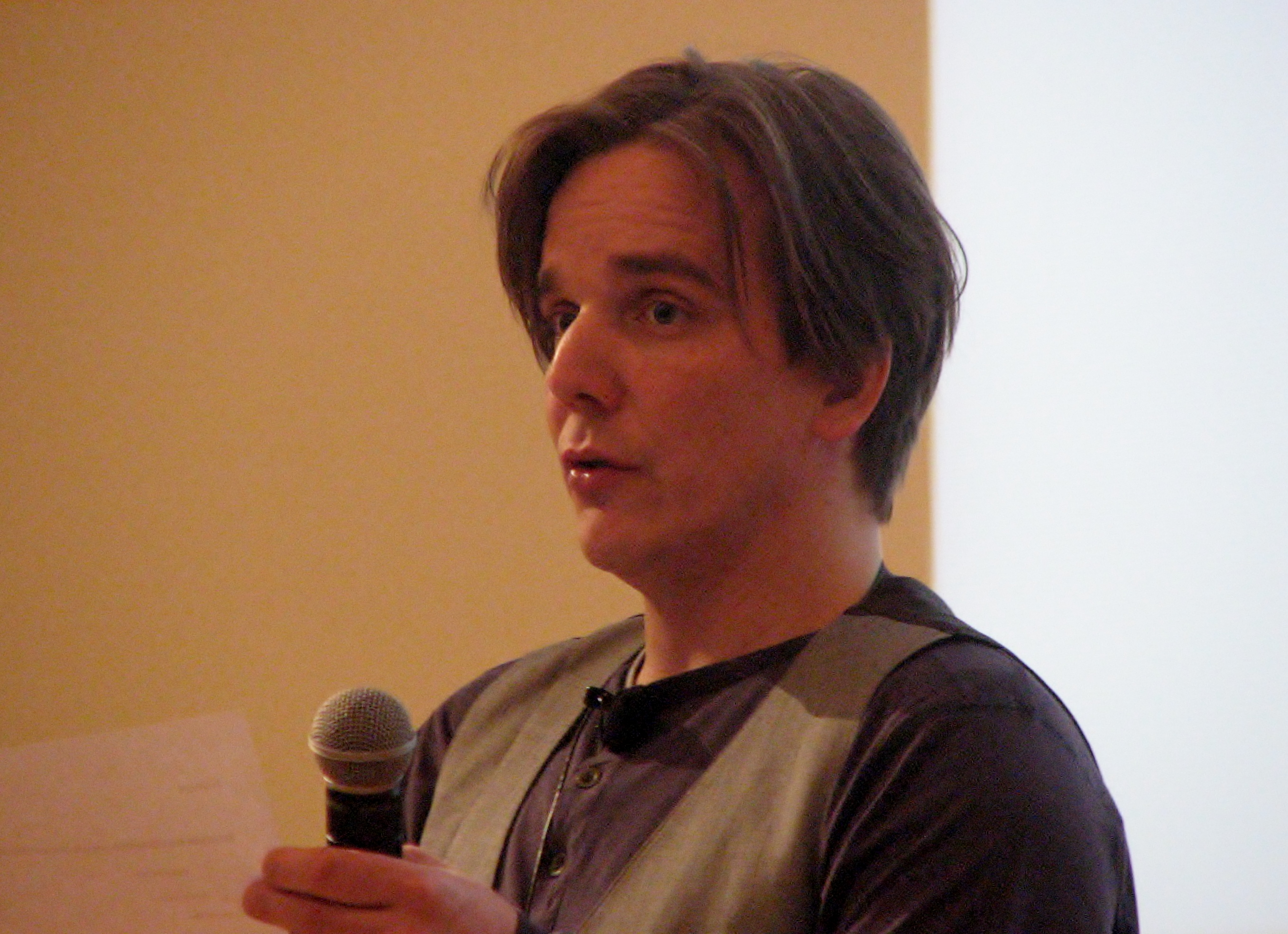 Taavi Tõnisson juhtimas 3. ja 4. klasside kirjandusmängu finaali